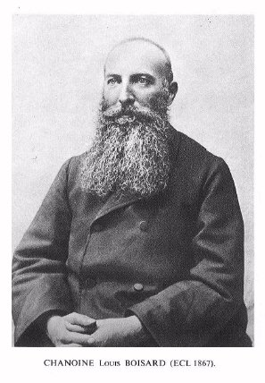 Chanoine Louis BOISARD, ECL'1867, fondateur des Ateliers d'apprentissage BOISARD.